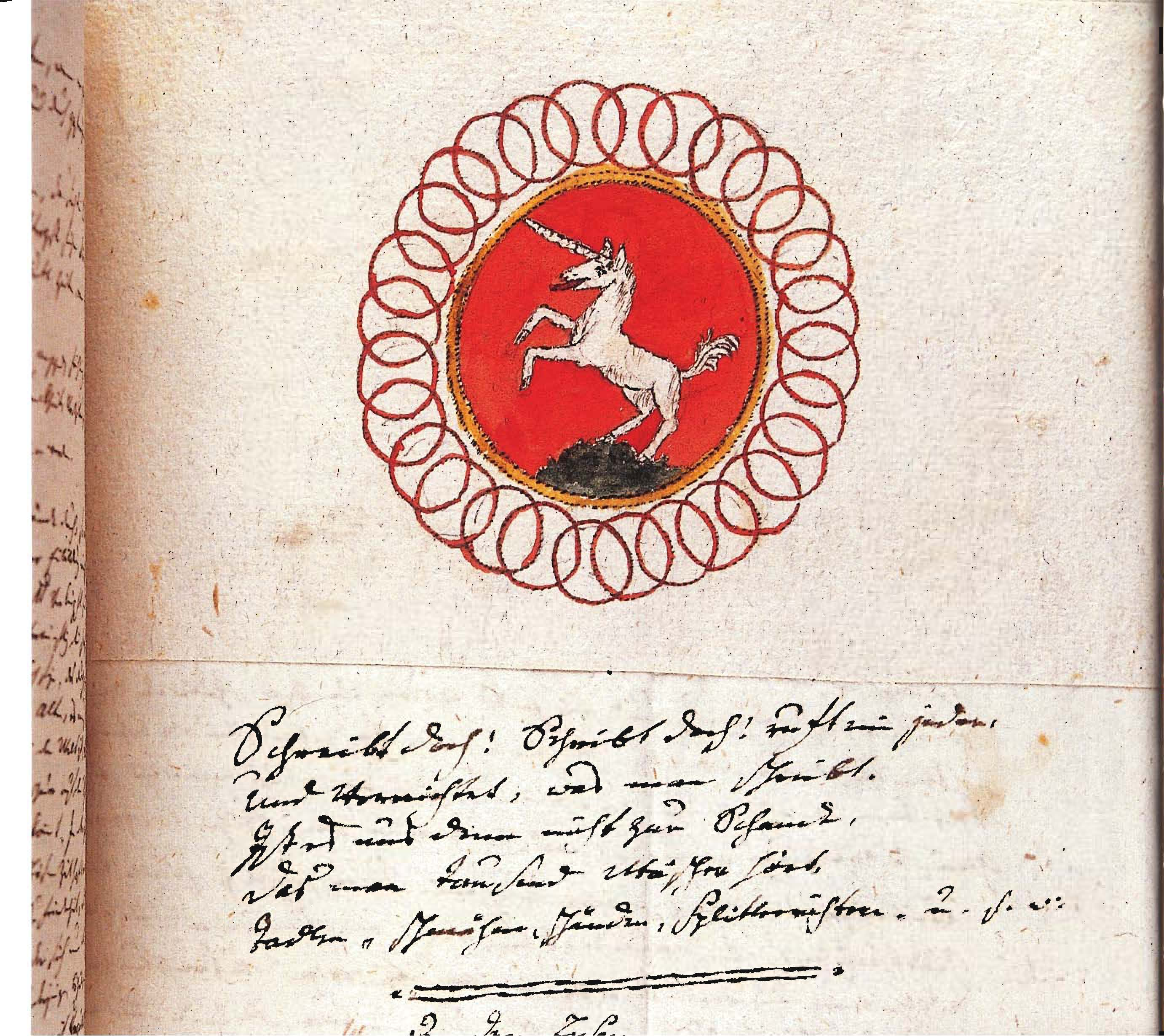 Das Einhorn als Wappentier der Stadt Schwäbisch Gmünd Debler VII, 425 (S. 86)